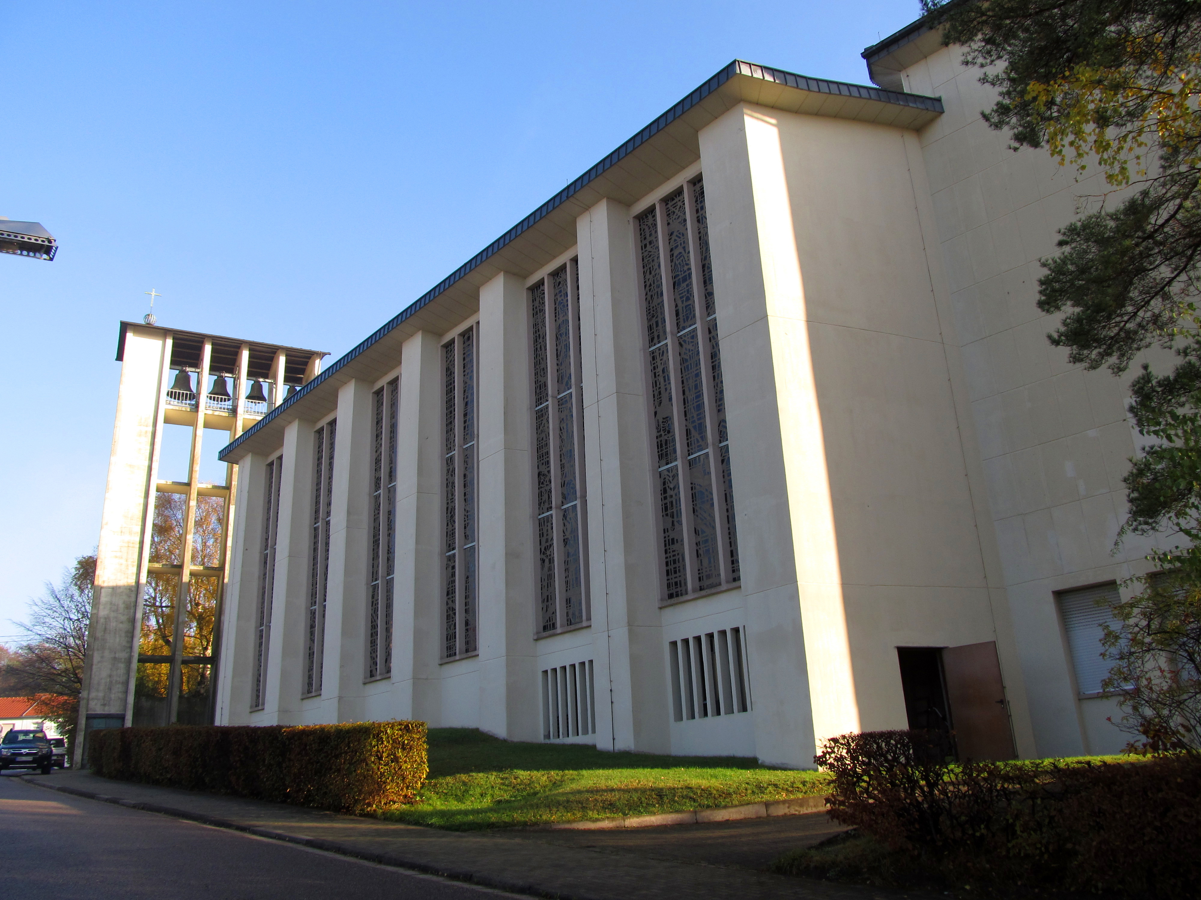 Katholische Pfarrkirche St. Barbara, Am Hang, Saarbrücken, Dudweiler